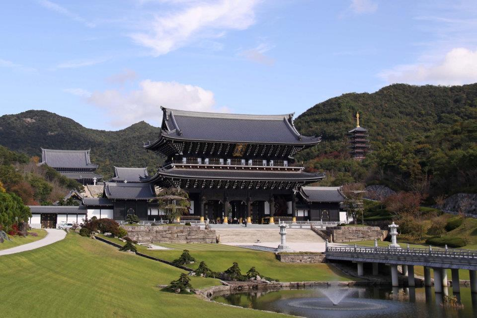 念佛宗三寶山無量壽寺 総本山 佛教之王堂の山門（ななめ横から）